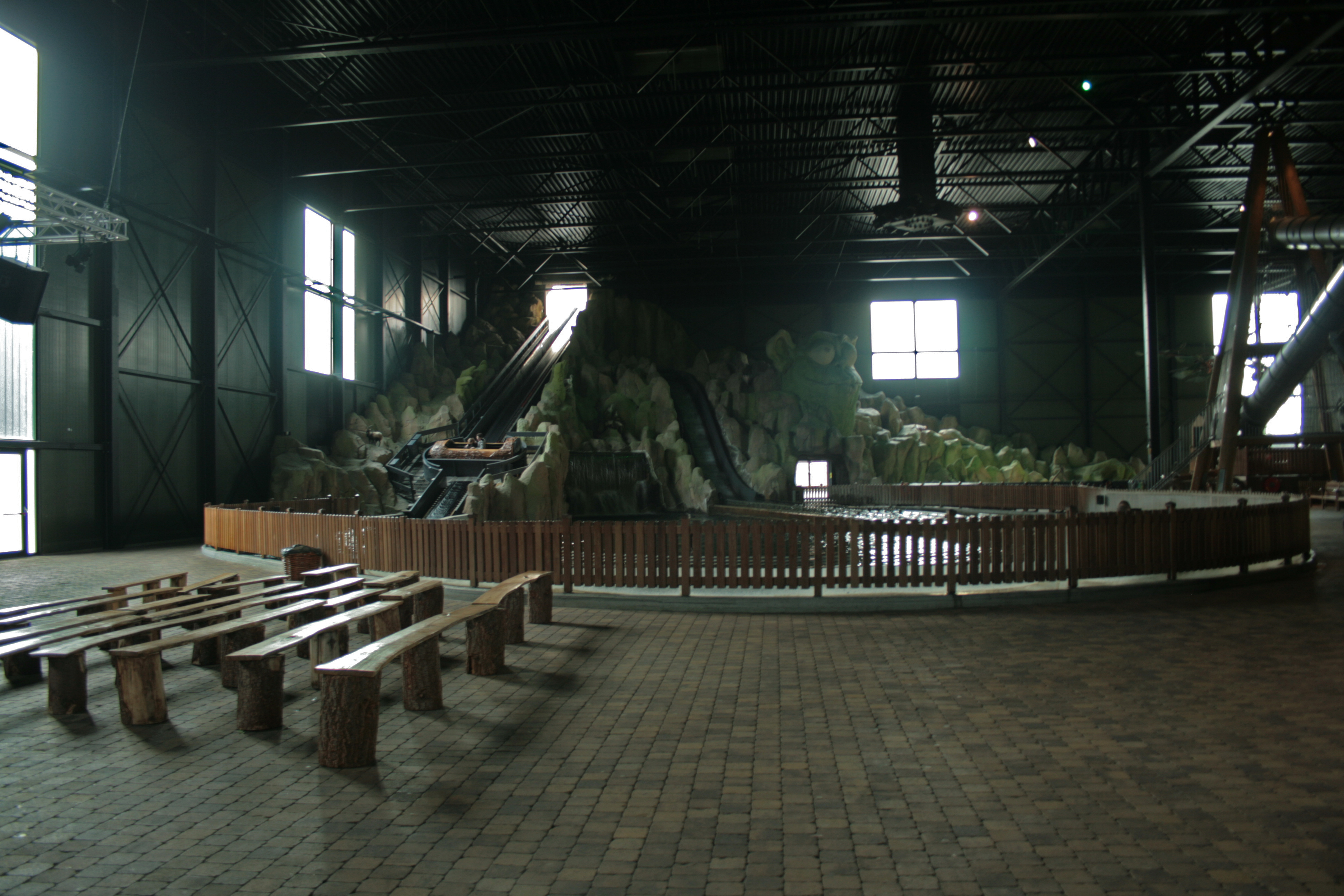 De boomstamattractie Backstroke in Attractiepark Toverland.